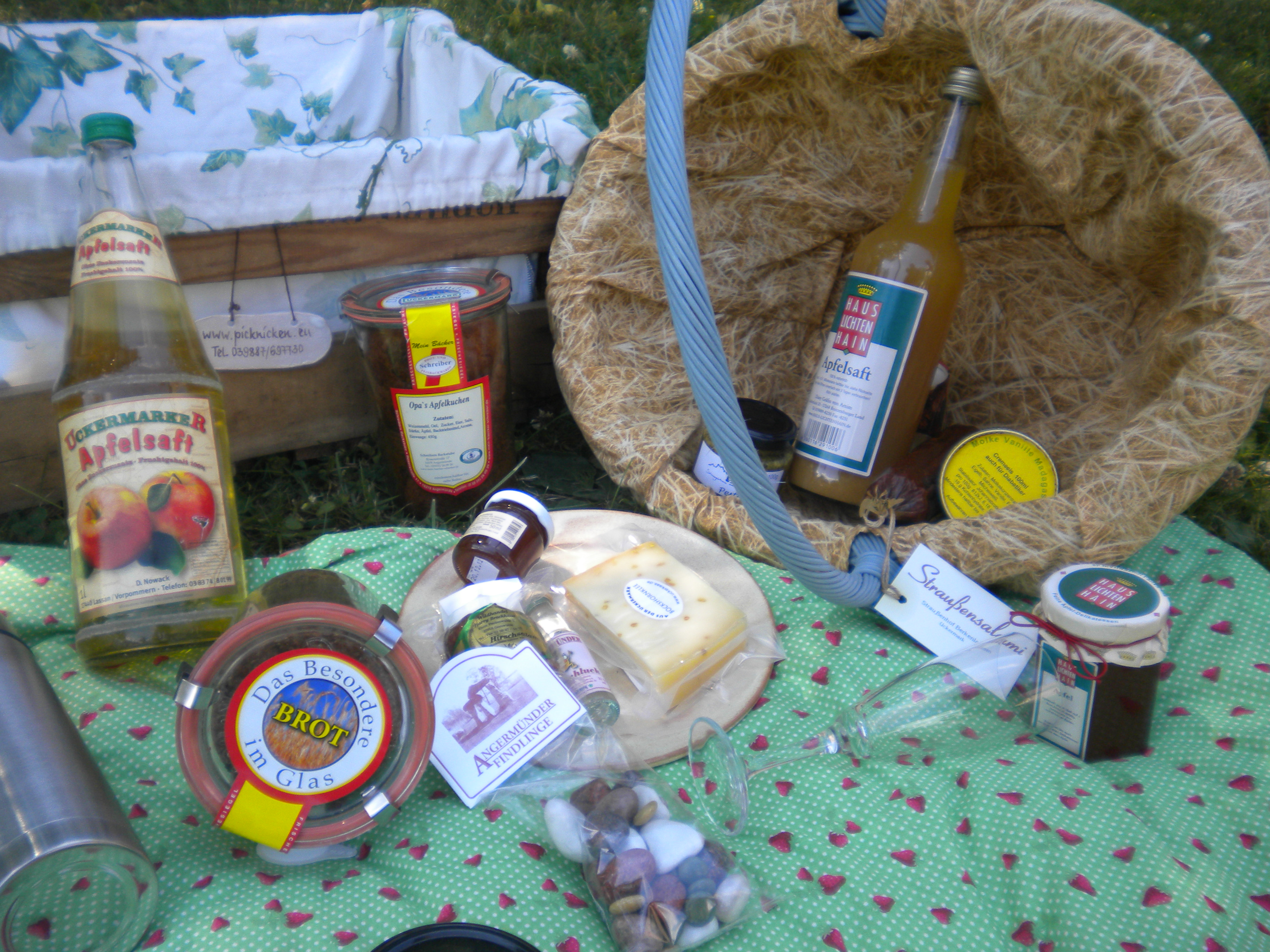 Der Picknickkorb mit regionalen Produkten der Uckermark aus Groß Fredenwalde